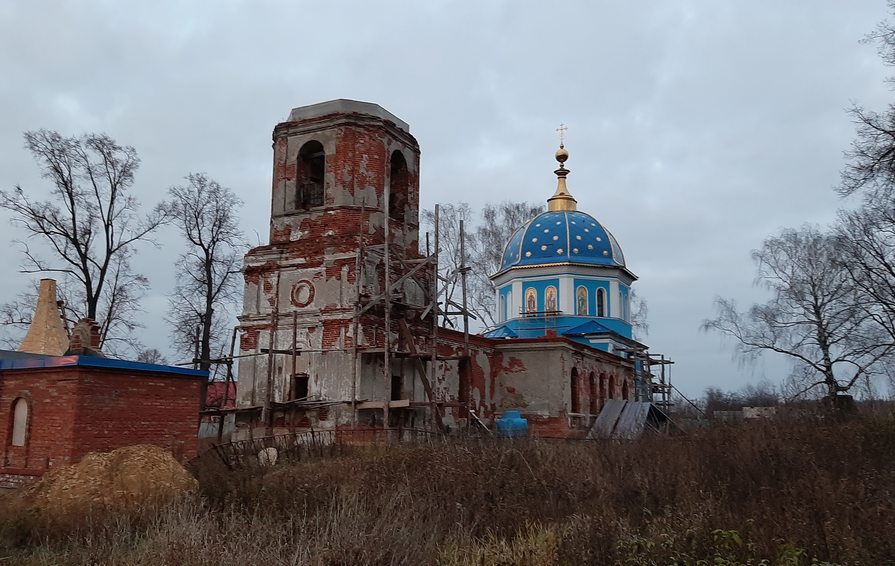 Церковь Успения Пресвятой Богородицы: Досчатое (ранее село Решное), Выксунский район, Нижегородская область